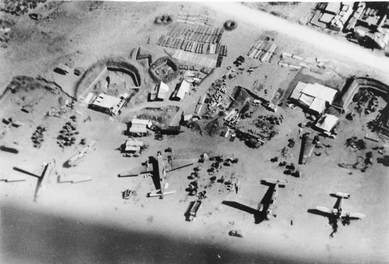 Südostfront. Ein Sammelplatz des Generalluftzeugmeisters auf Kreta. Beim Einsatz beschädigte Jus werden neu hergerichtet. (Maleme) PK-Aufnahme: Kriegsberichter: Krempl 8869-41 "Fr." Aug.1941